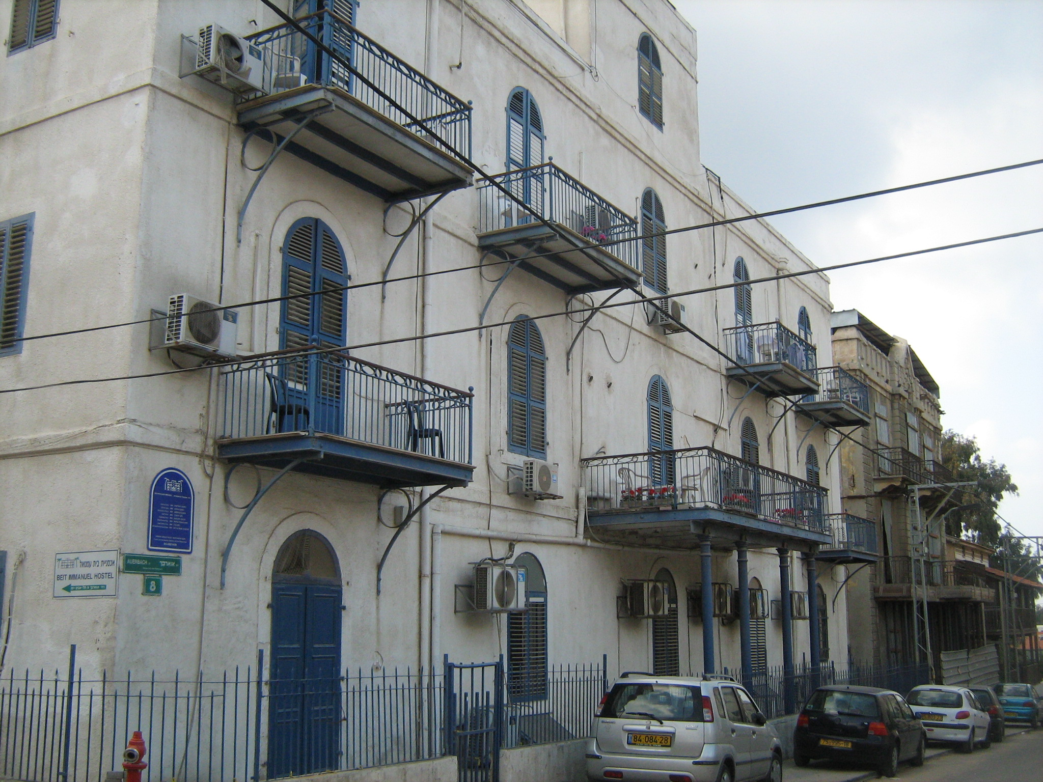 המושבה האמריקאית ביפו